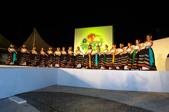 Presentación de las Embajadoras de Los 17 municipios en la Feria Tabasco.